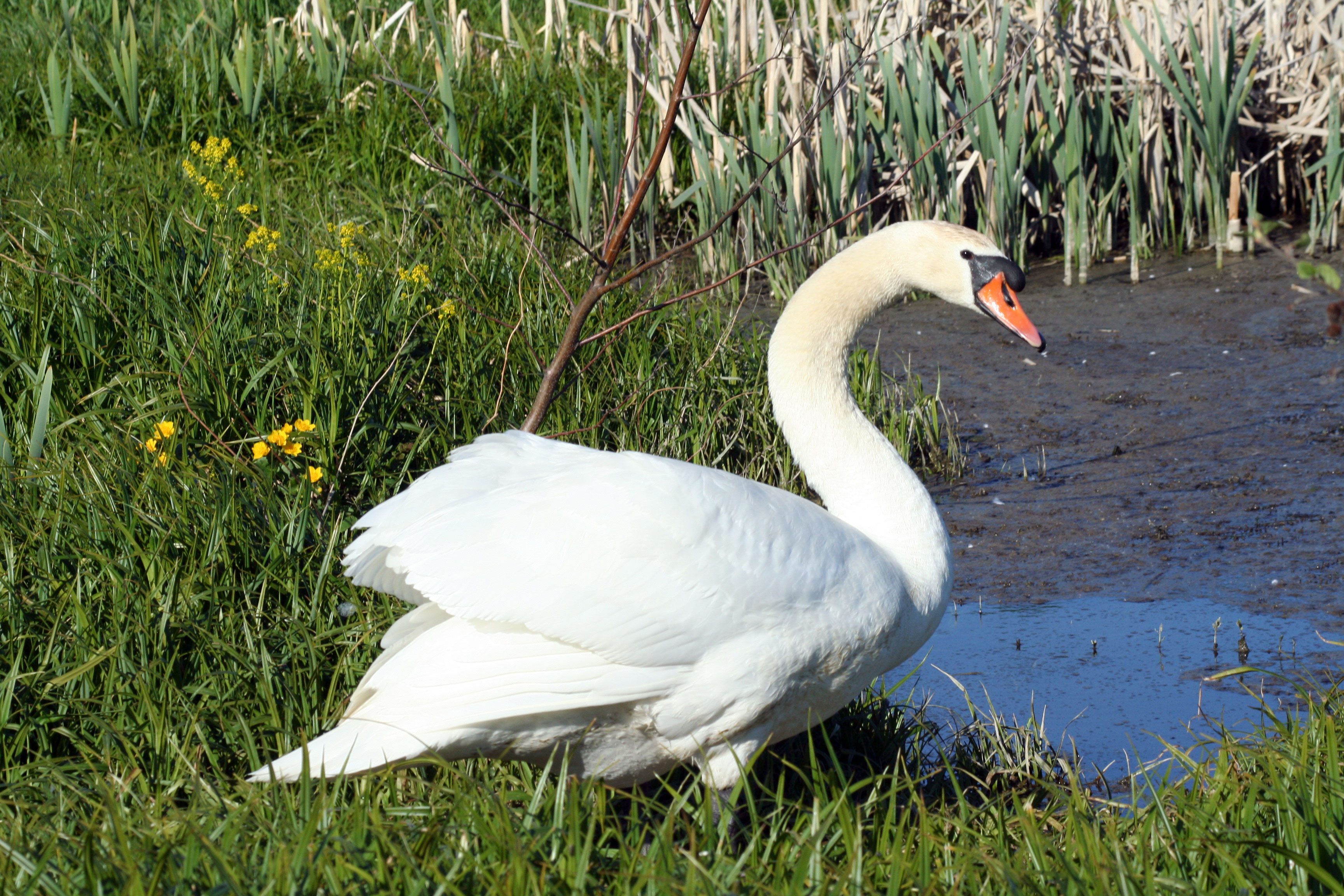 Knoppsvane på reir ved Juveren (kroksjø) på Ringerike